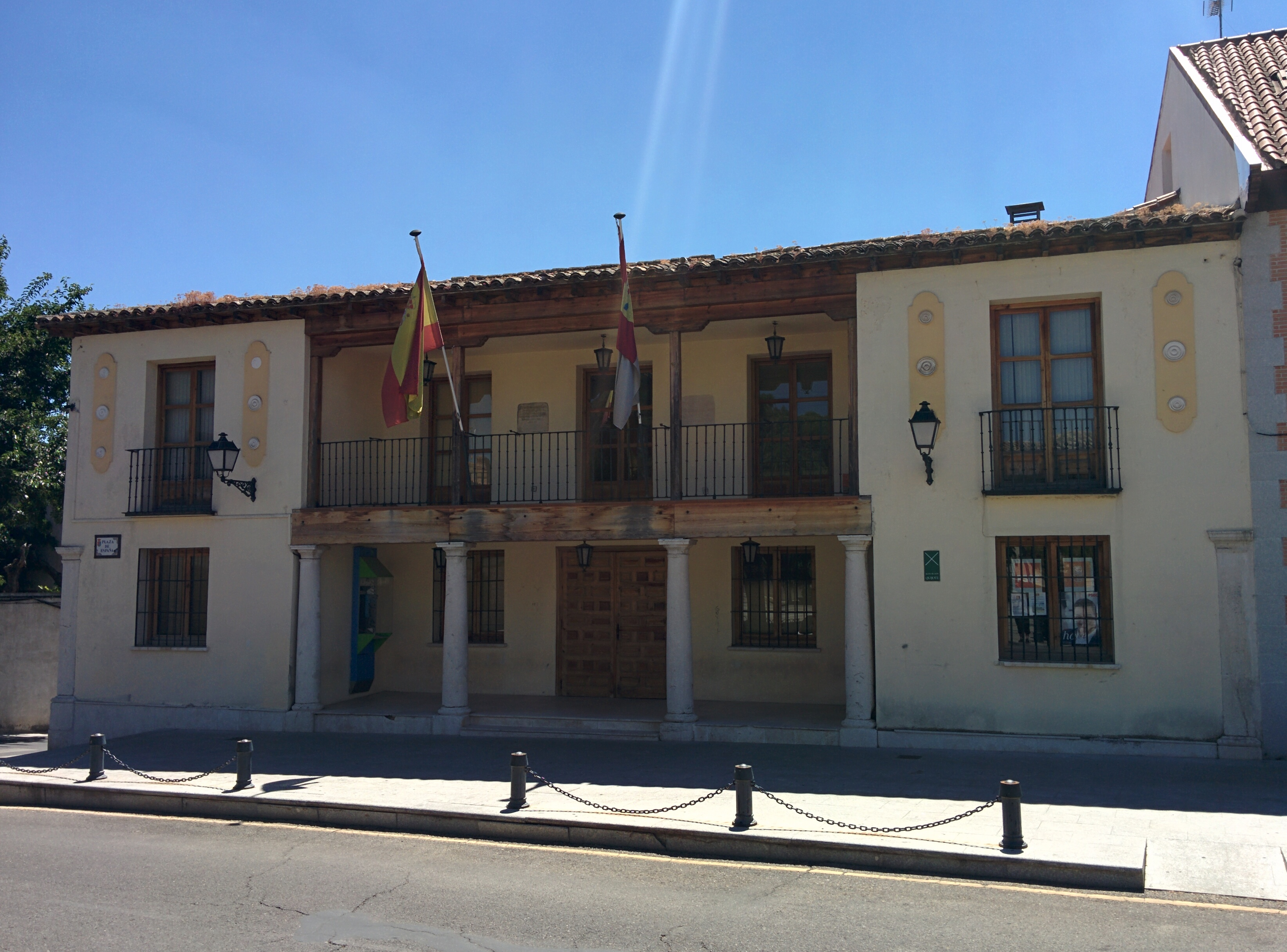 Casa consistorial de Esquivias (Toledo, España).